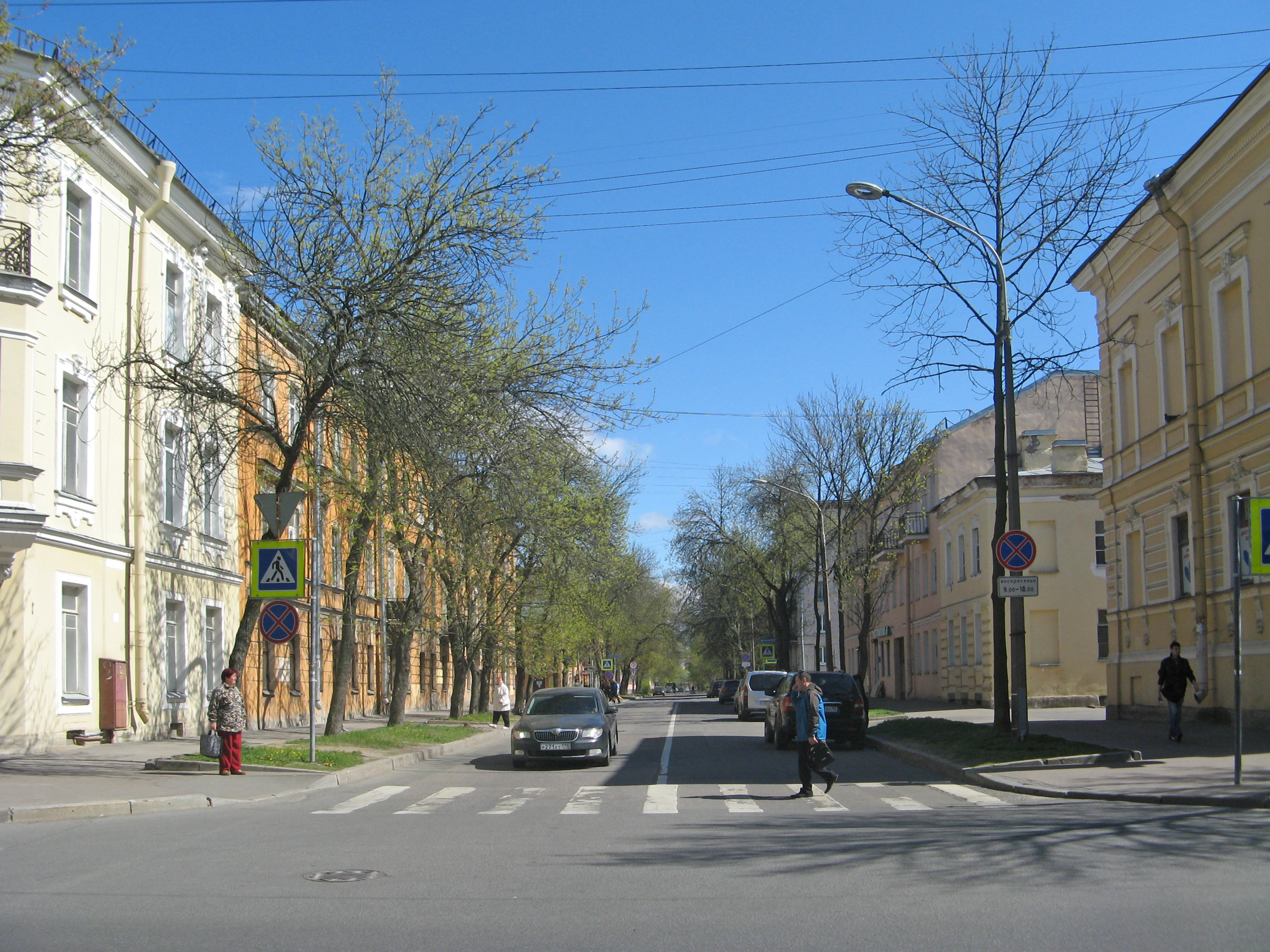 Кронштадт. Флотская улица